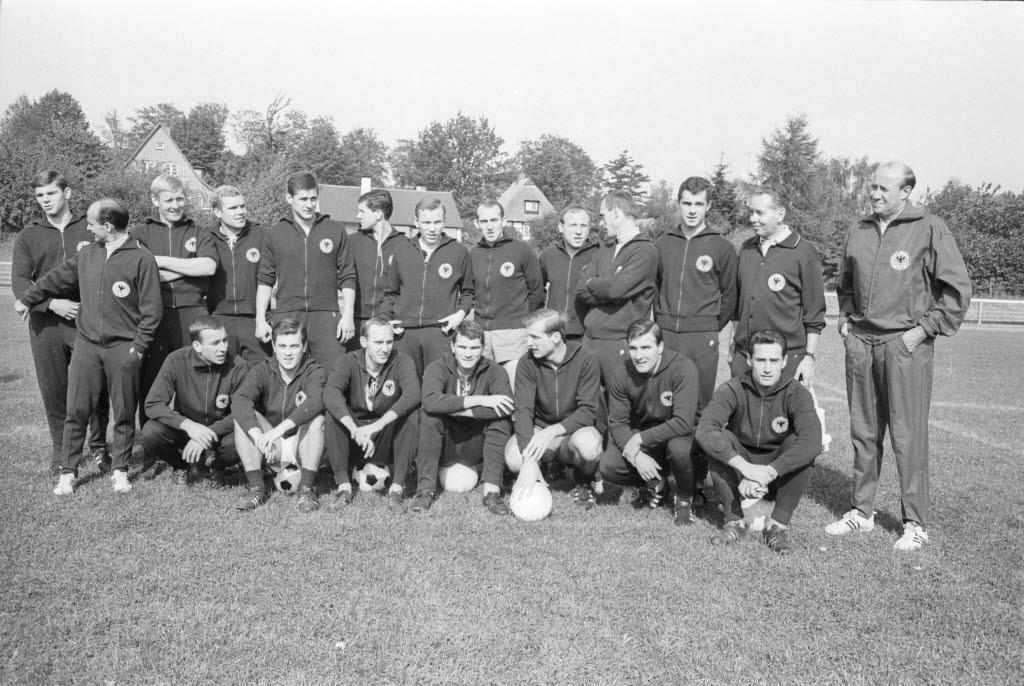 Trainingslager in der Sportschule Malente. Hintere Reihe von links: Wolfgang Weber, Trainer Dettmar Cramer, Karl-Heinz Schnellinger, Klaus-Dieter Sieloff, Max Lorenz, Horst Szymaniak, Werner Krämer, Peter Grosser, Uwe Seeler, Assistenz-Trainer Udo Lattek, Franz Beckenbauer, Masseur Erich Deuser, Nationaltrainer Helmut Schön. Vordere Reihe von links: Horst-Dieter Höttges, Alfred Heiß, Willi Schulz, Lothar Ulsaß, Manfred Manglitz, Rudolf Brunnenmeier, Hans Tilkowski.